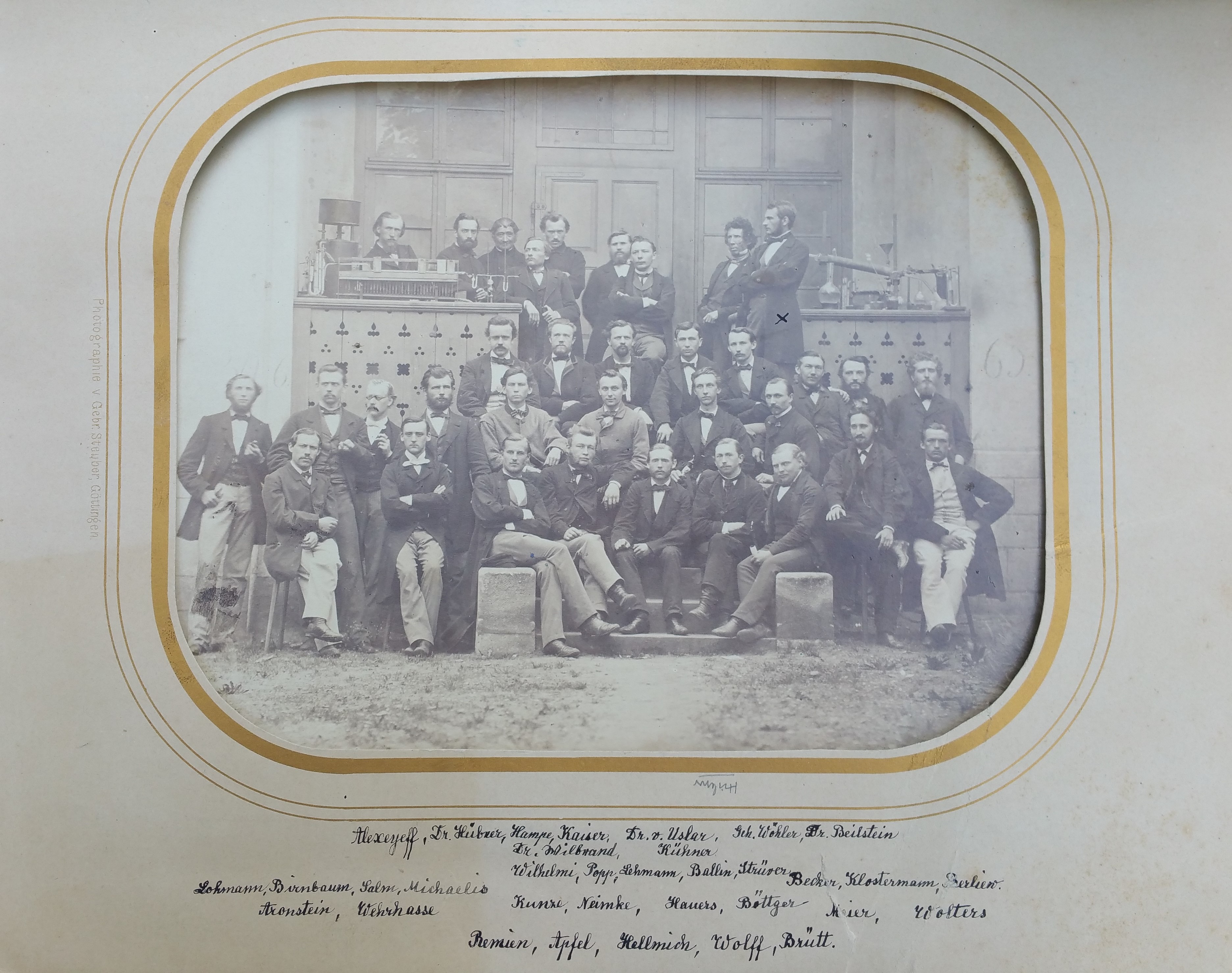 Göttinger Arbeitskreis Friedrich Wöhler mit Doktoranten und Gastdozenten 4. (oberste) Reihe, v.l.n.r. P. Alexeyeff Dr. Hans Hübner (* 13. Oktober 1837 in Düsseldorf; † 4. Juli 1884 in Göttingen), kurz vor Abschluß seiner Habilitation Dezember 1863. Hampe Dr. Julius Wilbrand (* 22. August 1839 in Gießen; † 22. Juni 1906 in Bielefeld) Kaiser Dr. Ludwig von Uslar (* 3. Juni 1828 in Lautenthal am Harz; † 14. April 1894 in Göttingen) Kühner Geheimrat Friedrich Wöhler (* 31. Juli 1800 in Eschersheim; † 23. September 1882 in Göttingen) Dr. Friedrich Beilstein (* 5.jul./ 17. Februar 1838greg. in Sankt Petersburg; † 5.jul./ 18. Oktober 1906greg. in St. Petersburg), Privatassistent von Wöhler 3. Reihe v.l.n.r. Wilhelmi, Popp, Lehmann, Ballin, Stöver. 2. Reihe v.l.n.r. Lohrmann Karl Birnbaum (* 14. Oktober 1839 in Helmstedt; † 20. Februar 1887 in Karlsruhe), prom. Juli 1864 bei Wöhler Salm, Michaelis, Dietrich Cunze (* 1. Oktober 1840 in Wolfenbüttel), prom. August 1864 bei Hübner Neimke, Hauers, Böttger, Becker, Klostermann, Berlie. . 1.(vorderste) Reihe v.l.n.r. Ludwig (Louis) Aronstein (* 25. Mai 1841 in Telgte; † 13. Februar 1913 in Den Haag), prom. März 1864 bei Hübner Georg Wehrhane (* 19. September 1840 in Hildesheim), prom. Mai 1864 bei Hübner Remien, Apfel, Hellmich, Wolff, Brütt, Meier, Wolters.